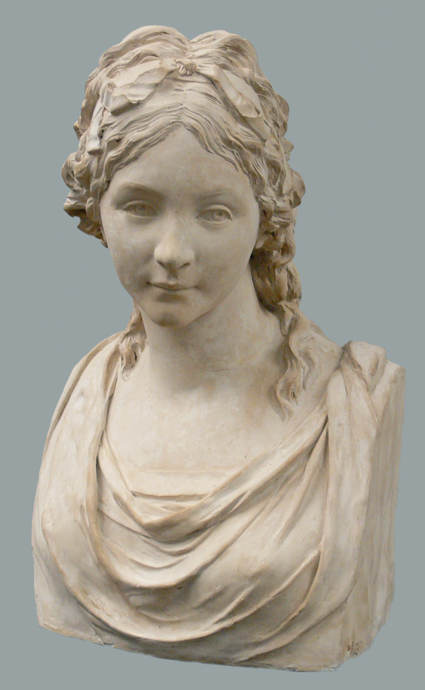 Johann Gottfried Schadow: Friederike von Preußen, 1795 Ceramic, 53 x 34.5 x 23 cm Gallery: Alte Nationalgalerie Berlin, BB II 75 = G 35